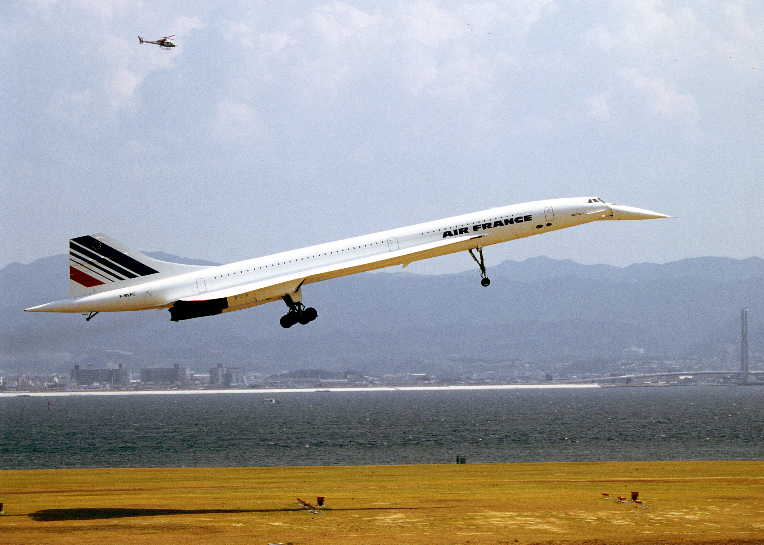 関西空港に飛来したエールフランス コンコルド